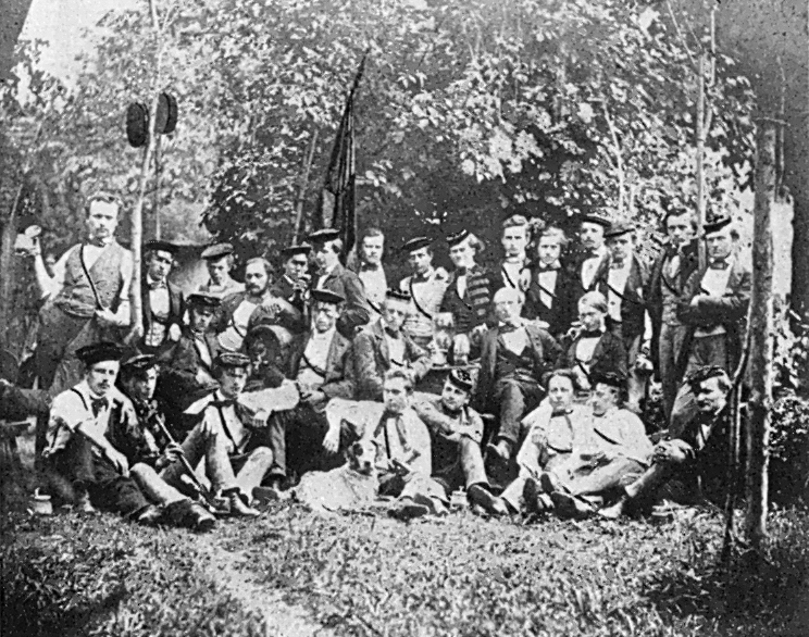 Die Tübinger Königsgesellschaft Roigel im Kurzischen Garten (Salzpapierabzug)